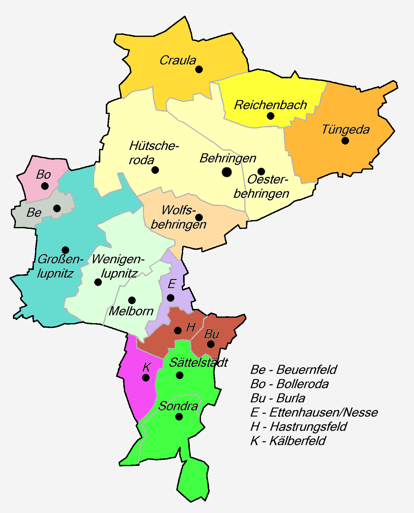 Kartensatz zur Gemeindeentwicklung